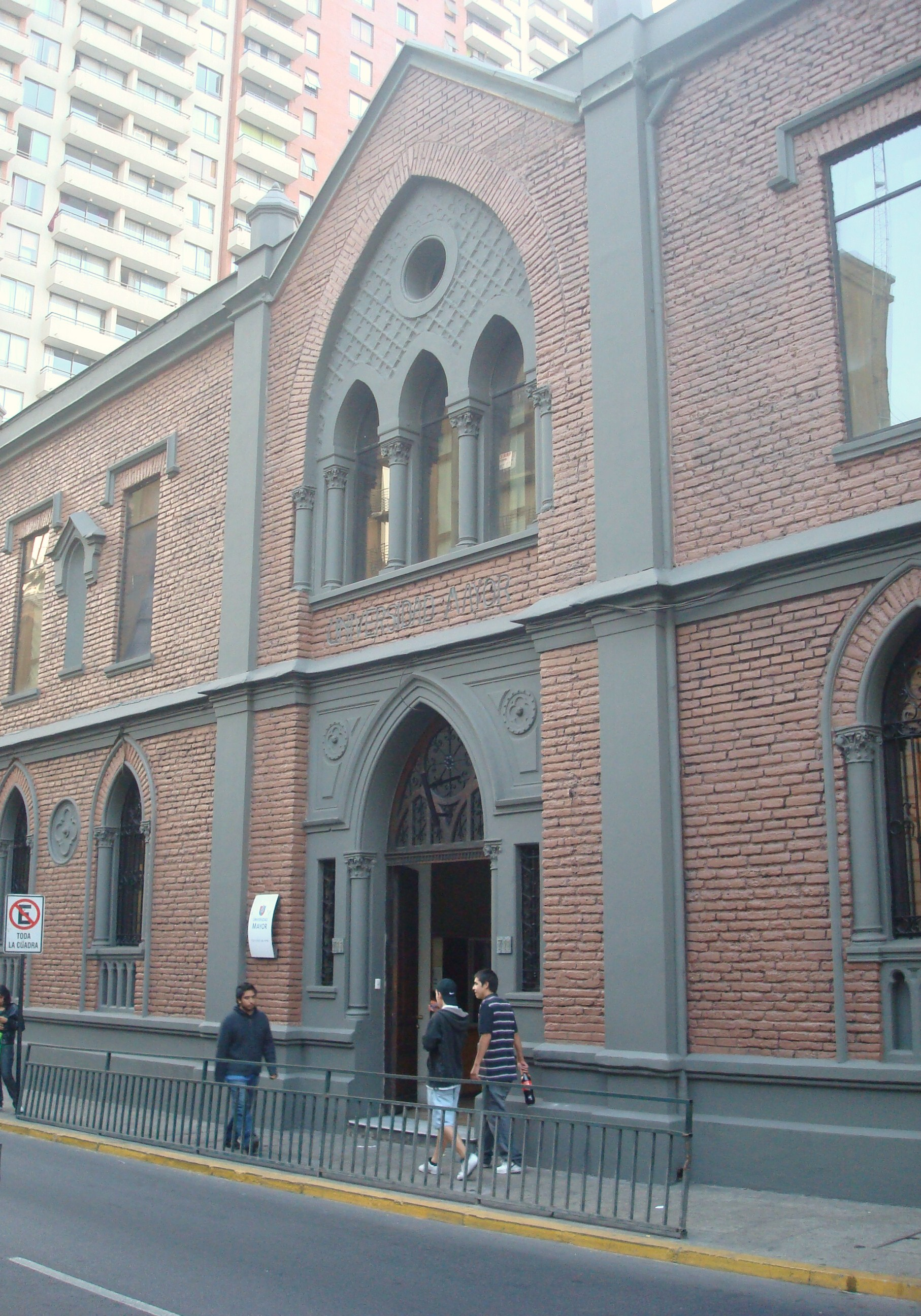 Facultad de Arte de la Universidad Mayor, Santiago Centro, Chile